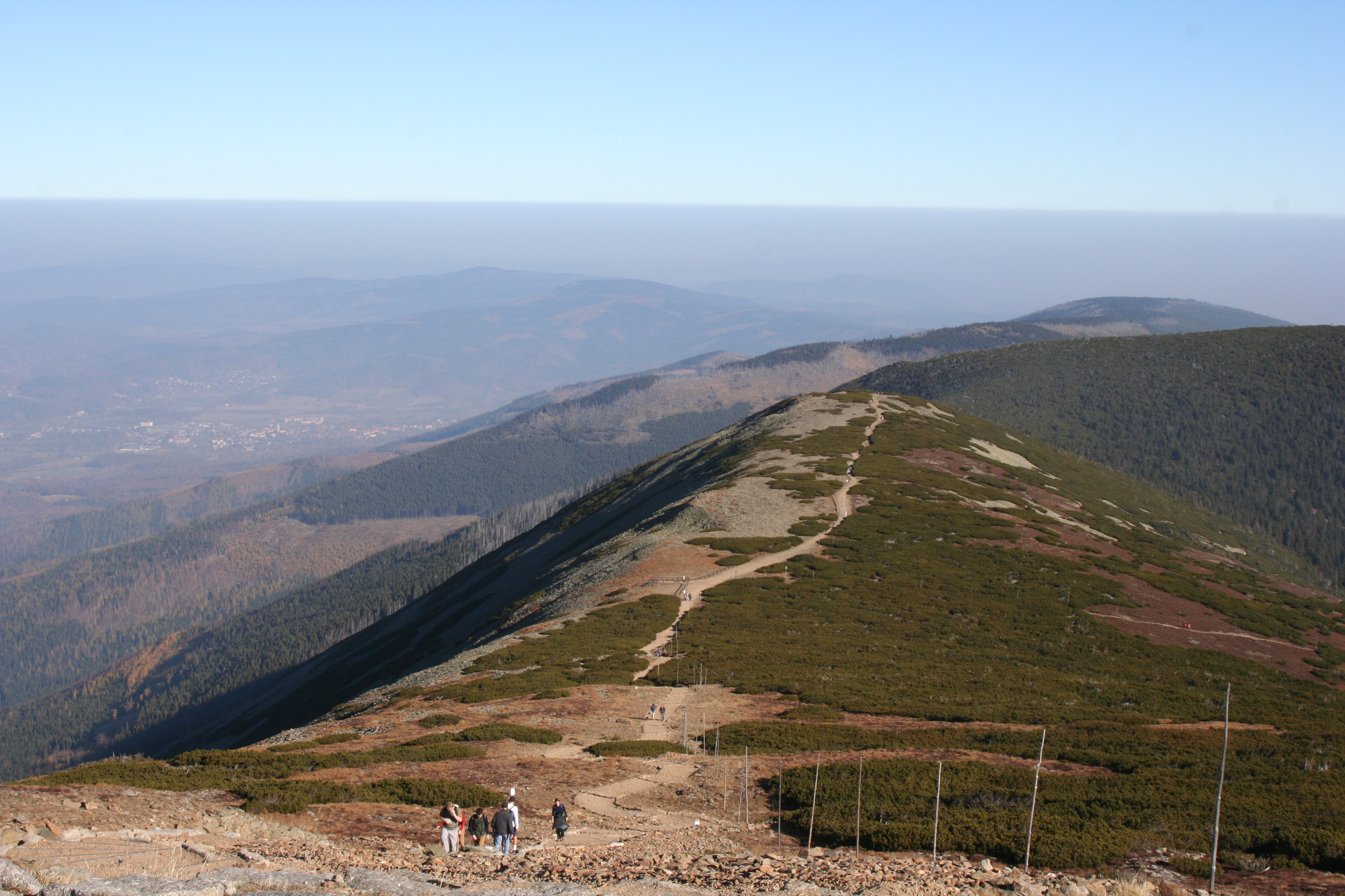 Czarny Grzbiet. View from Snezka.